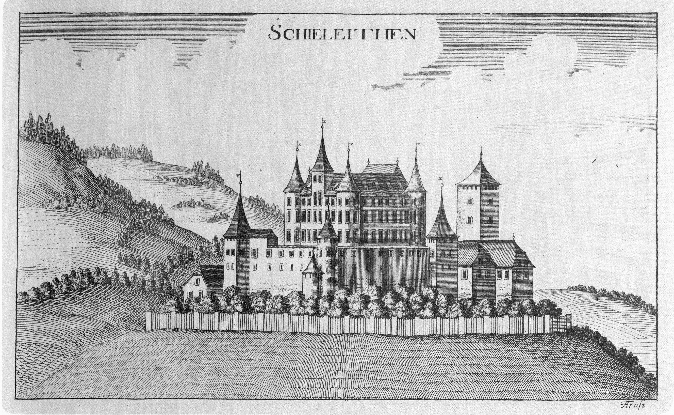 G. M. Vischers Käyserlichen Geographi, Topographia Ducatus Stiriae, Das ist: Eigentliche Delineation / und Abbildung aller Städte / Schlösser / Marcktfleck / Lustgärten / Probsteyen / Stiffter / Clöster und Kirchen / so es sich im Herzogthumb Steyrmarck befinden; Und anjetzo Umb einen billichen Preyß zu finden seynd Bey Johann Bitsch Universitäts Buchhandlern / Auff dem Juden=Platz bey der guldenen Saulen. Graz 1681 Die Nummerierung der Dateien folgt der alphabetischen Reihung der Ortsnamen und entspricht nicht dem Vischer-Register